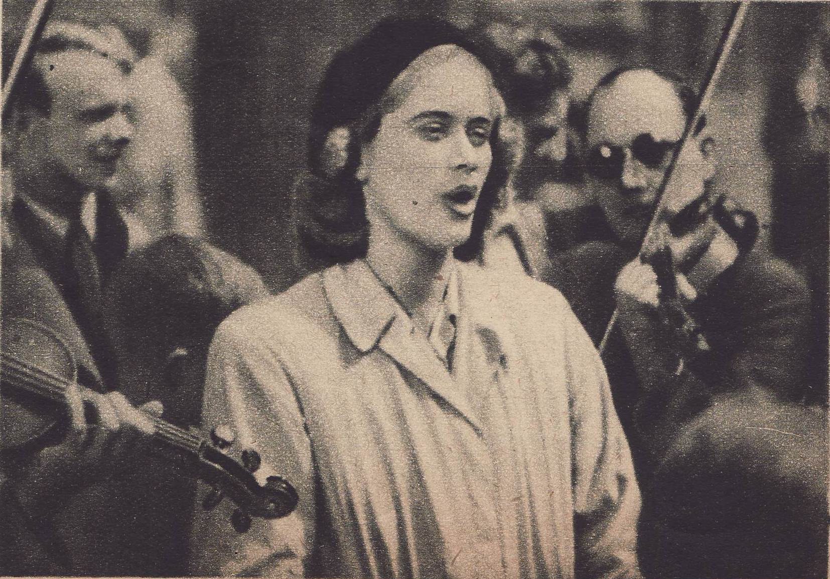 Kadr z filmu fabularnego Zakazane Piosenki nakręconego w 1946 roku w zburzonej Warszawie.